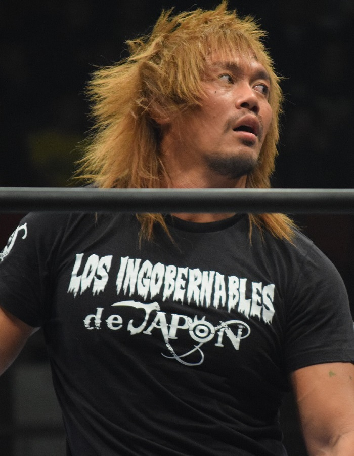 2016年2月11日 大阪府立体育会館 「THE NEW BEGINNING in OSAKA」 内藤哲也